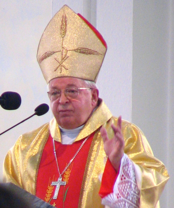 Zdjęcie bp Kazimierza Górnego